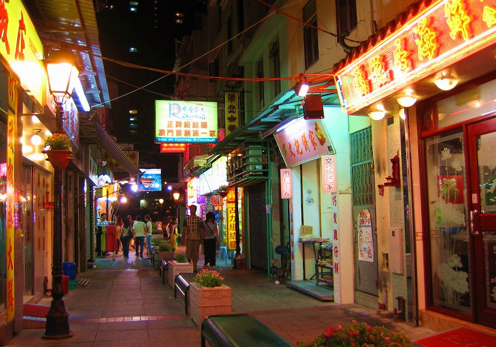 Rua do Cunha